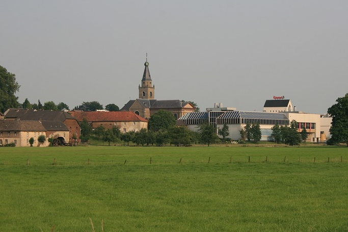 Zicht vanuit Stokhem op de Brand Bierbrouwerij, Molen Otten en de Kerk van Wijlre.